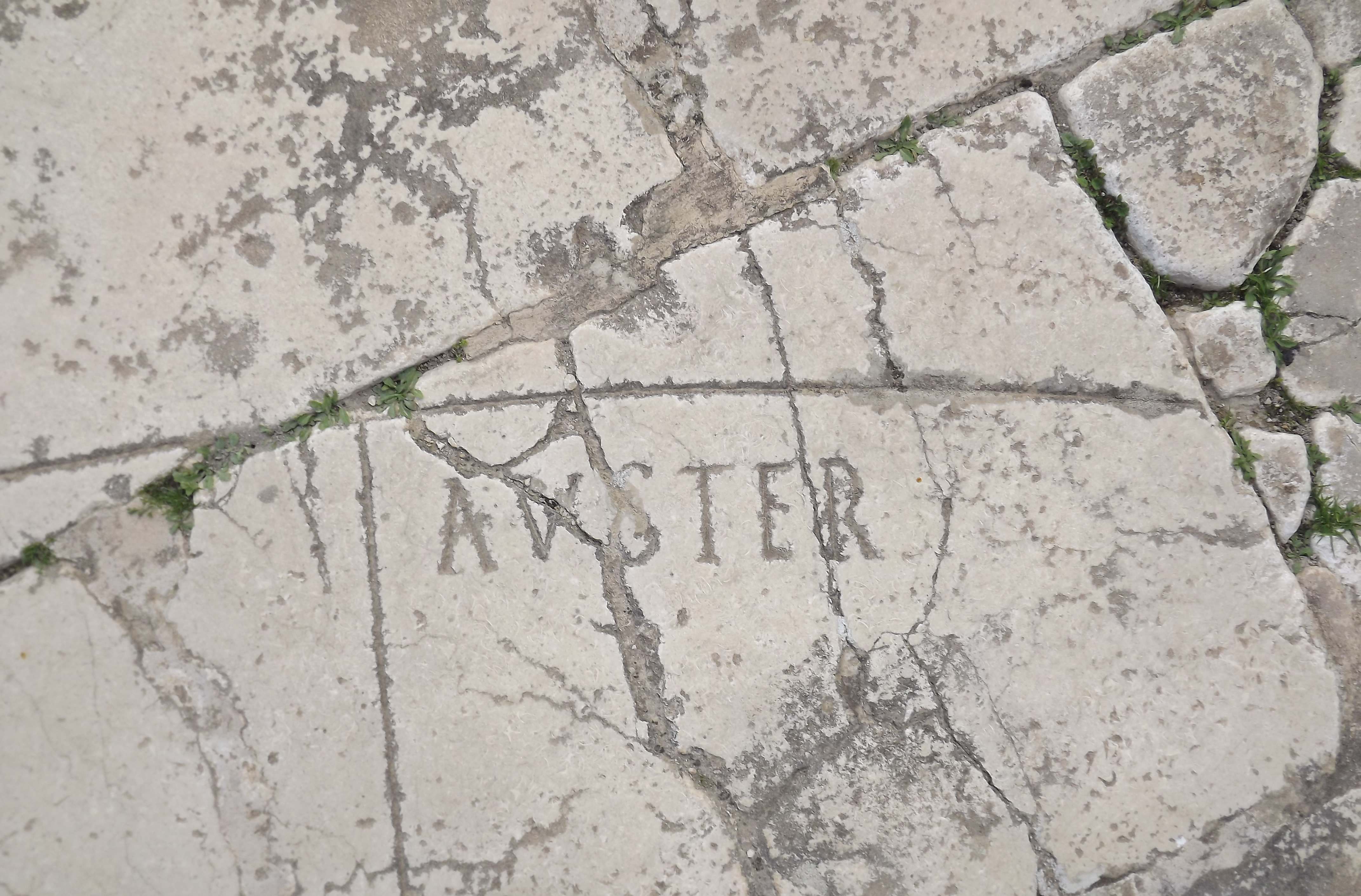 Site archéologique de Dougga